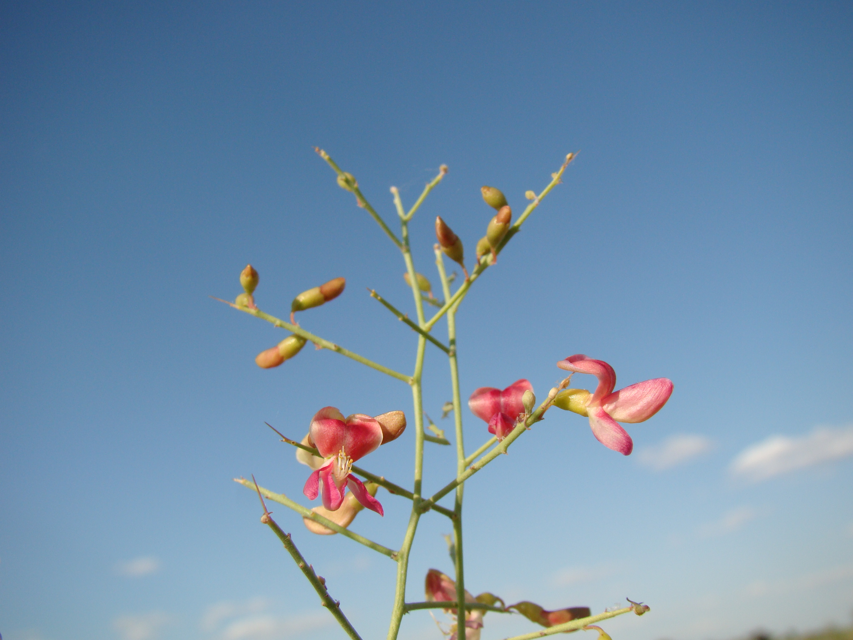 Верблюжья колючка (Alhagi sp.). Окрестости города Байконур, Казахстан